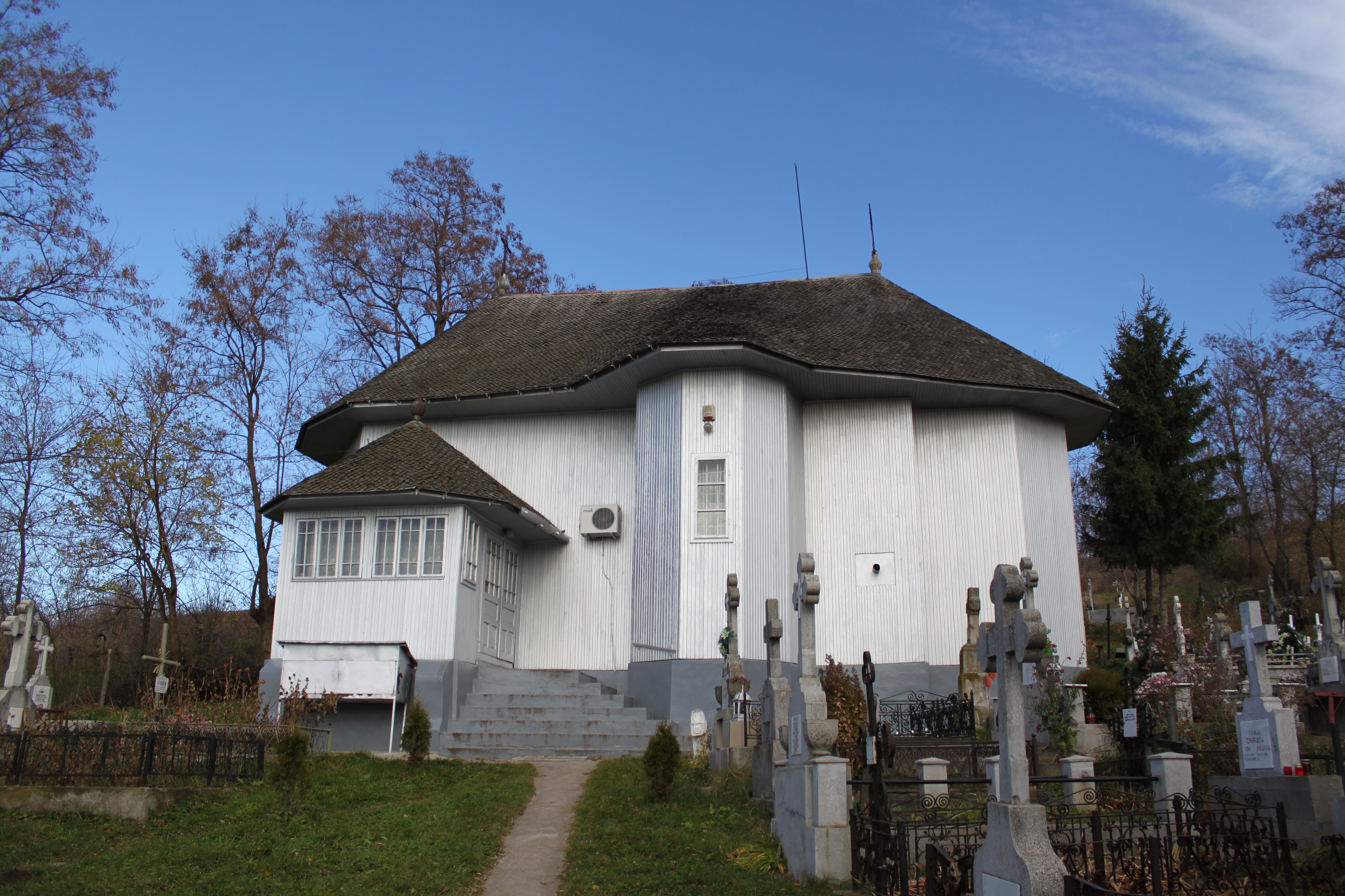 Biserica de lemn Sfântul Ioan Botezătorul din Gura Văii, judeţul Neamţ.